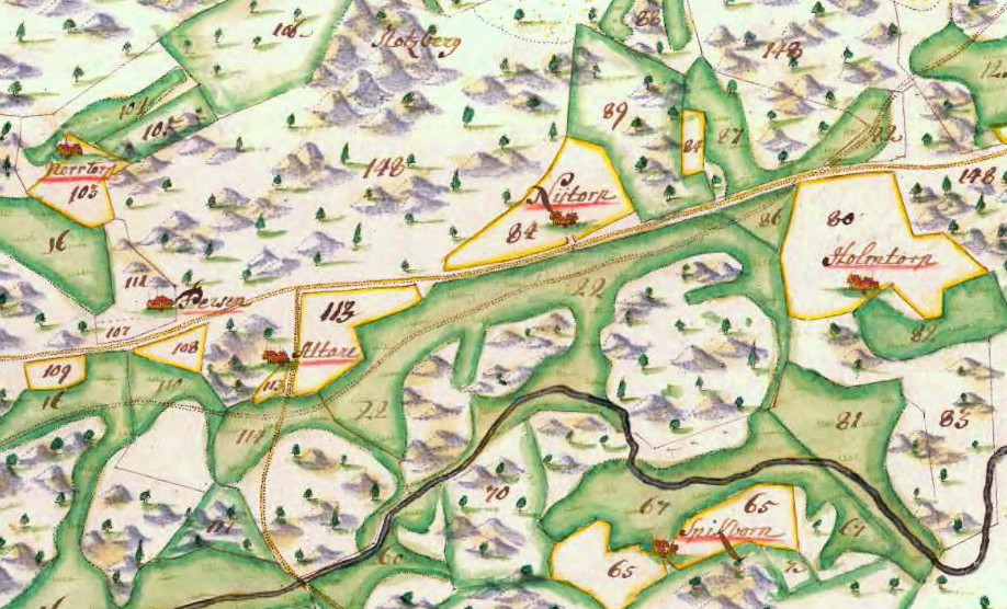 General Carta öfwer Vårby säteri 1703 med bl.a. Altertorp, Nytorp, Spikborn